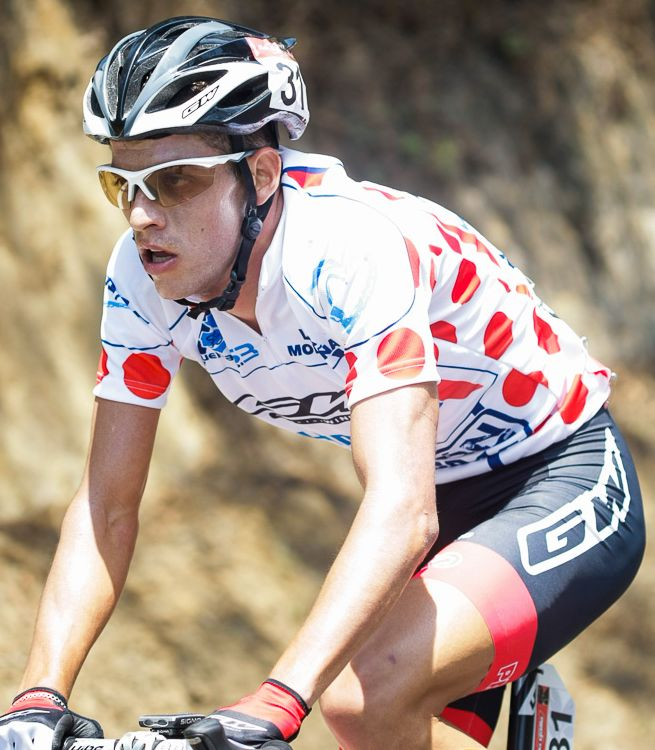 Ciclista colombiano Oscar Eduardo Sánchez en la 2ª etapa de la Vuelta a Guatemala 2013